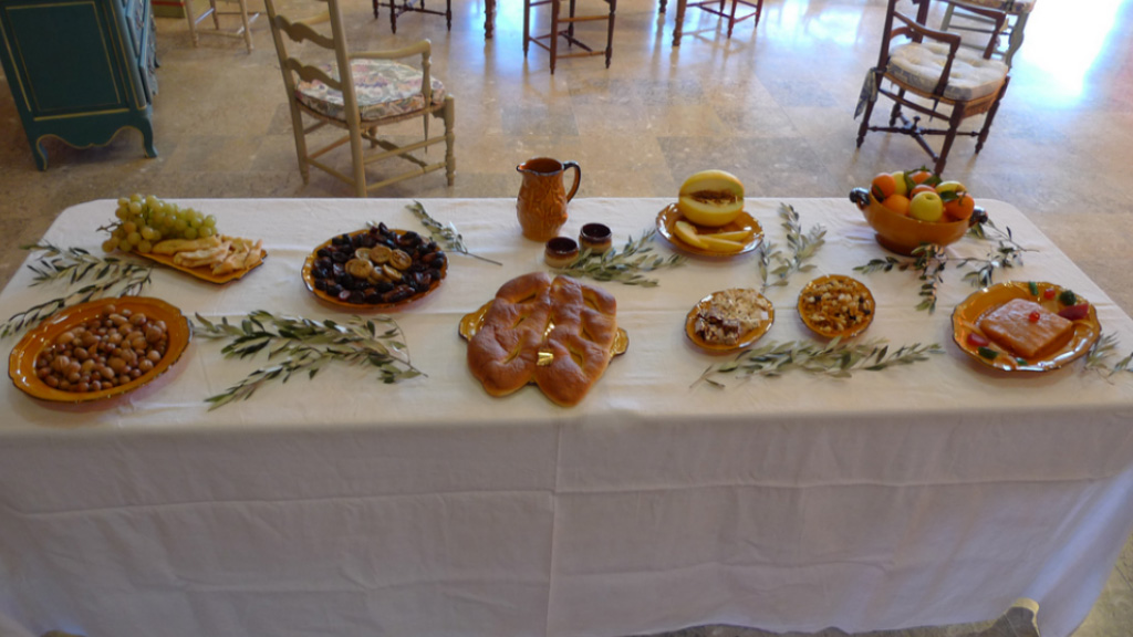 Caderousse, les treize desserts présentés au salon des santonniers